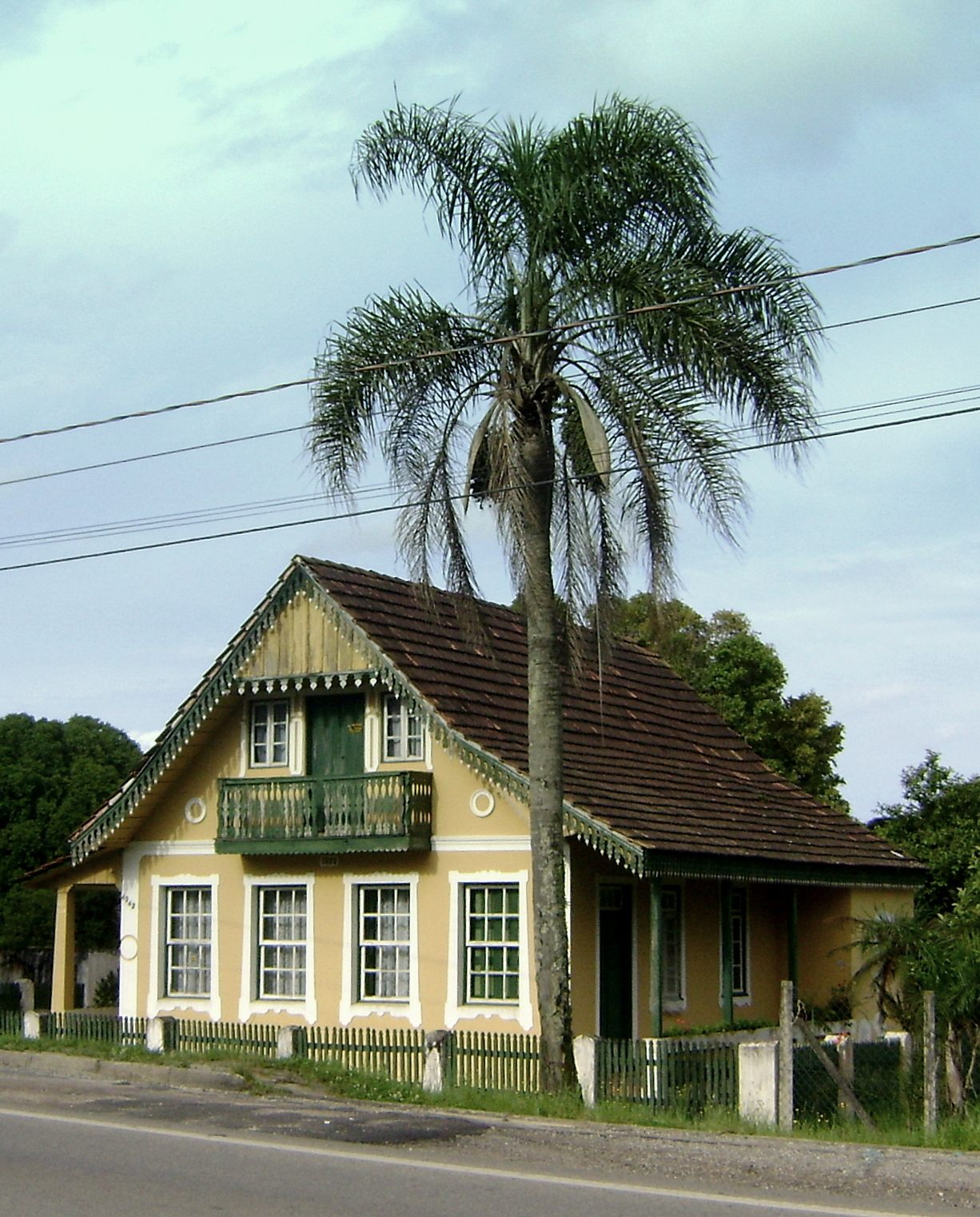 Casa típica de imigrantes italianos em Colombo, PR, sul do Brasil. Localizada as margens da Rodovia da Uva, próxima a sede do município.